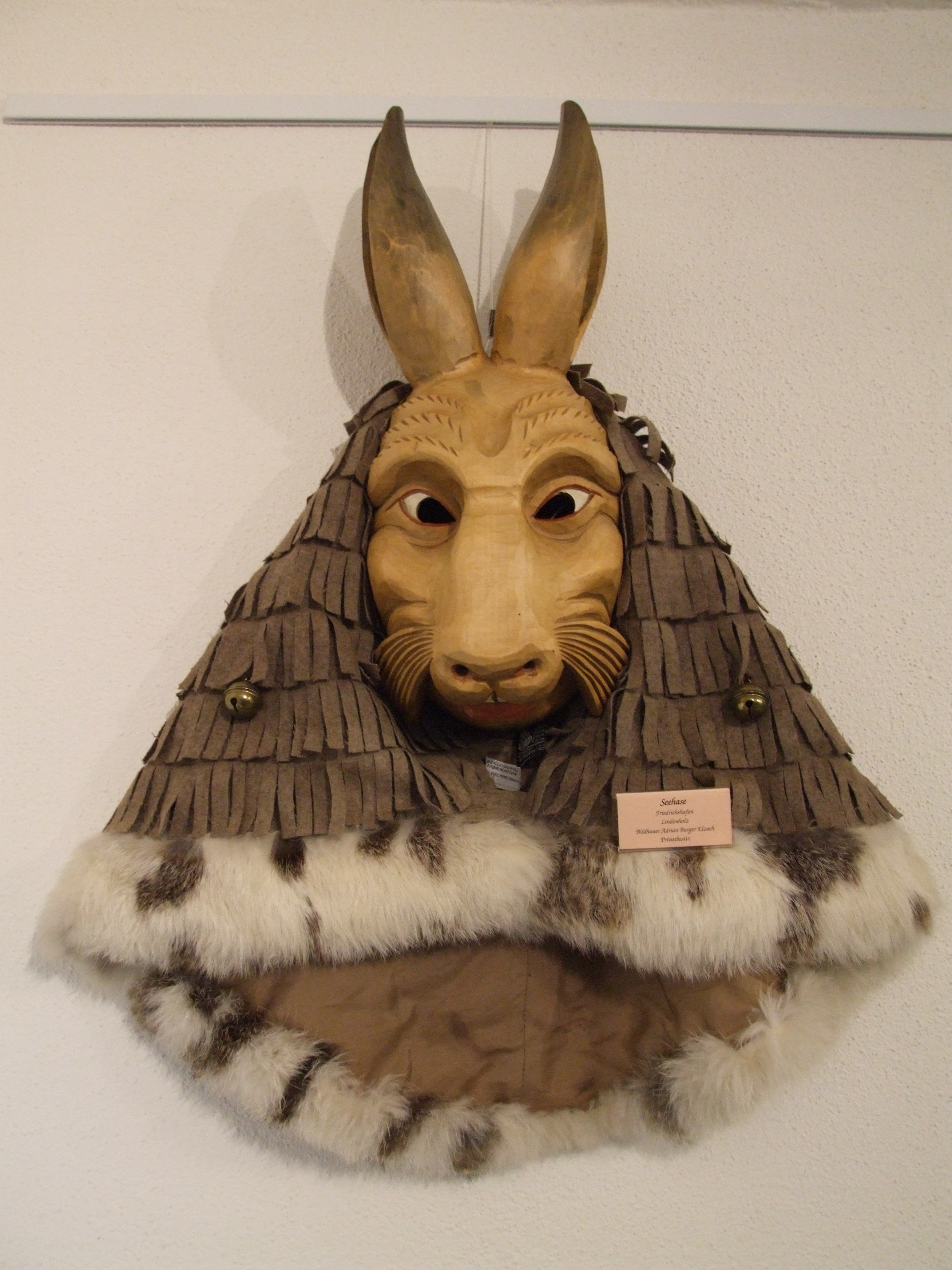 Seehase aus Friedrichshafen, eine lokale Fasnachtsfigur, geschnitzt aus Lindenholz von Adrian Burger, aufgenommen bei der Jubiläumsausstellung des Fasnachtsmuseums Speyer